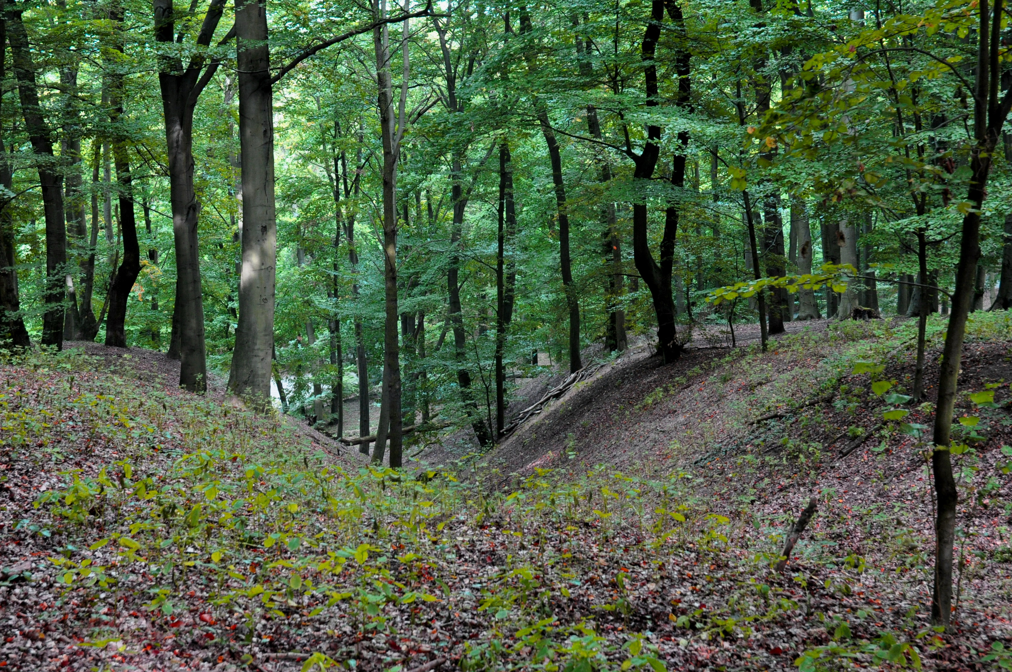 Park Klein-Glienicke Partie in den "Karpathen"